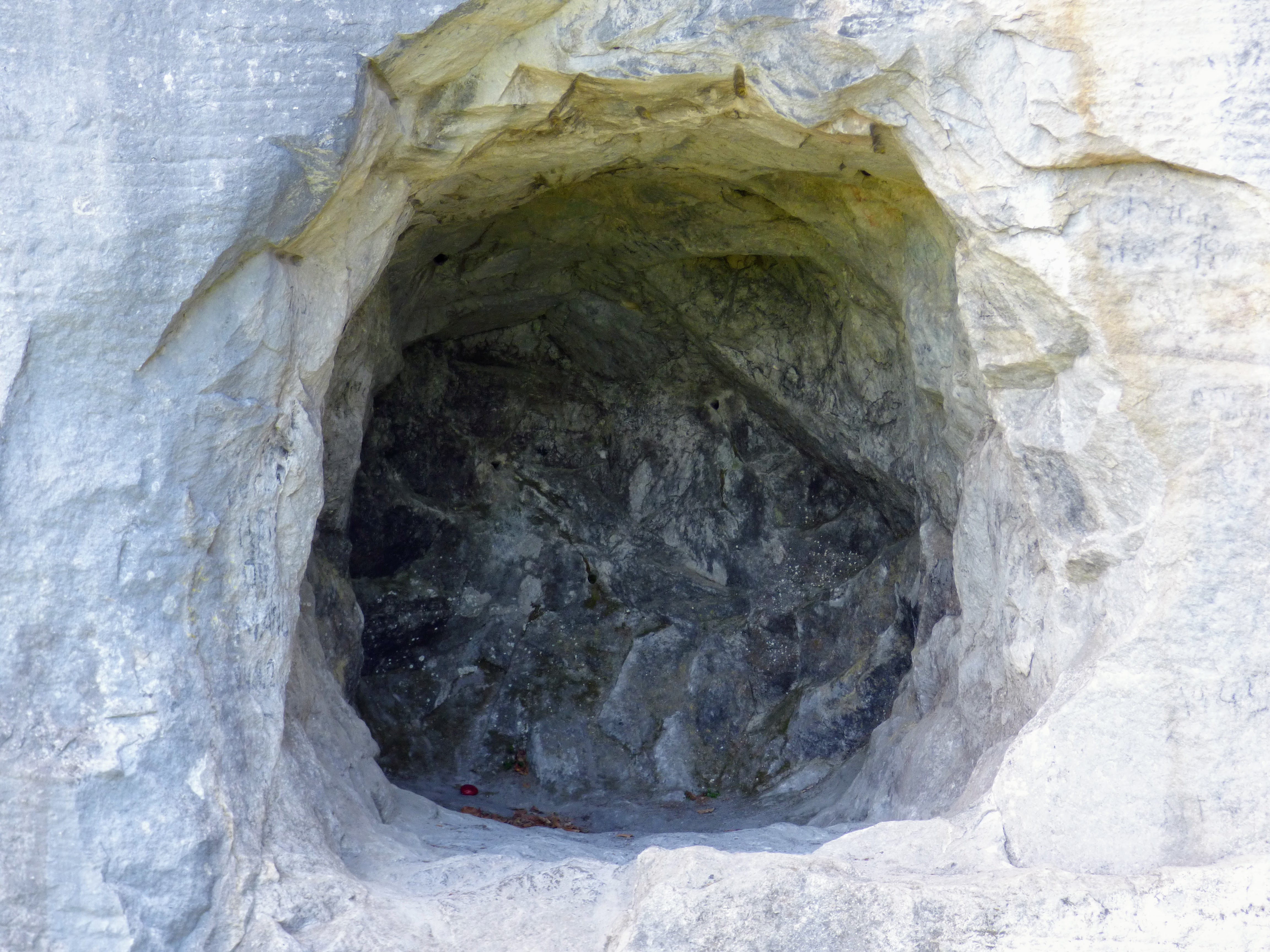 Römischer Steinbruch Spitzelofen, Gemeinde St. Georgen im Lavanttal, Kärnten Stollen eines Schatzsuchers